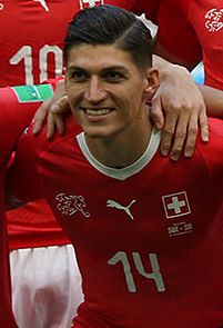 Сборная Швеции зрелищно вышла в четвертьфинал ЧМ-2018